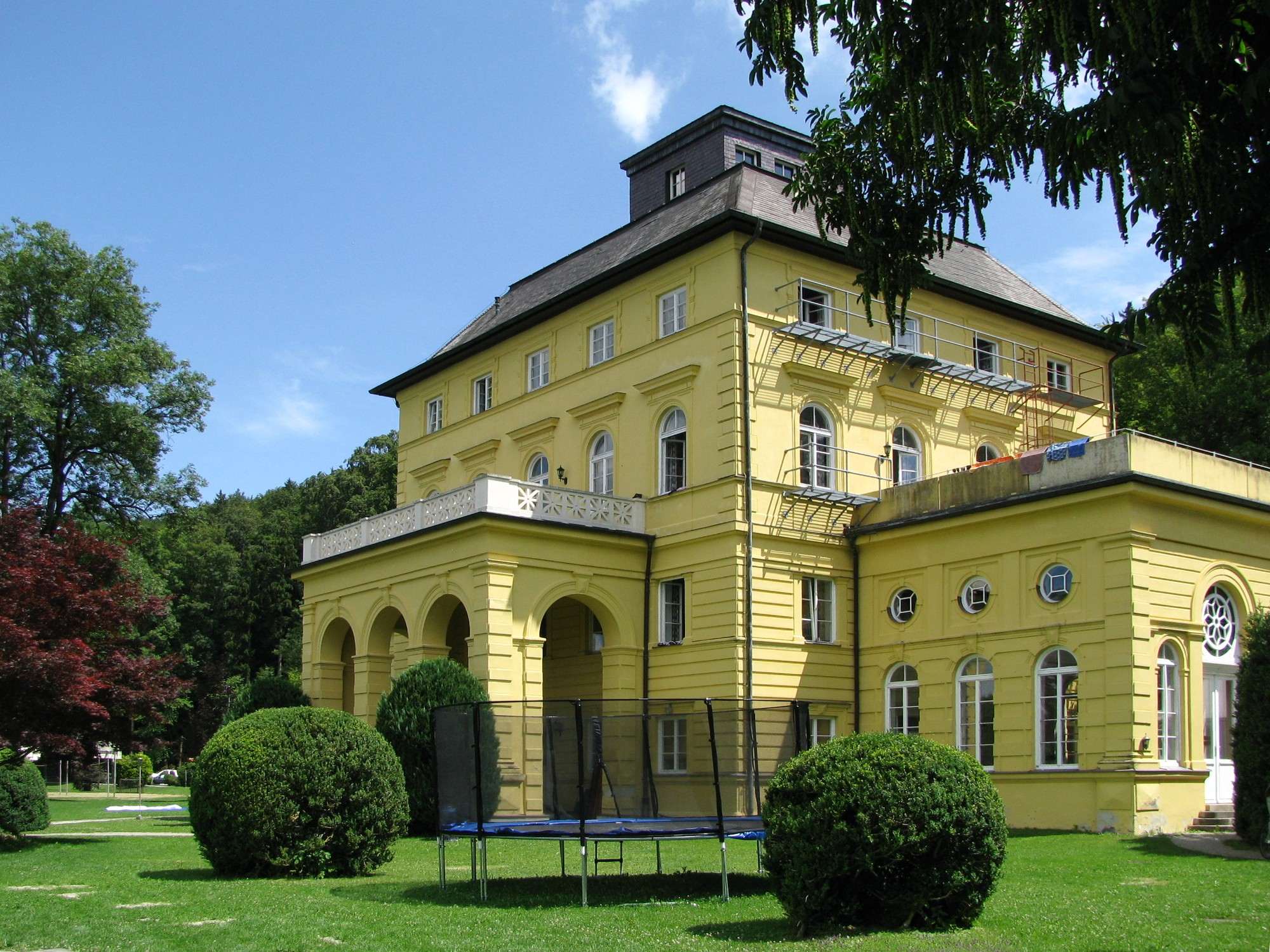 Schloss Allmannshausen am Starnberger See Ostufer